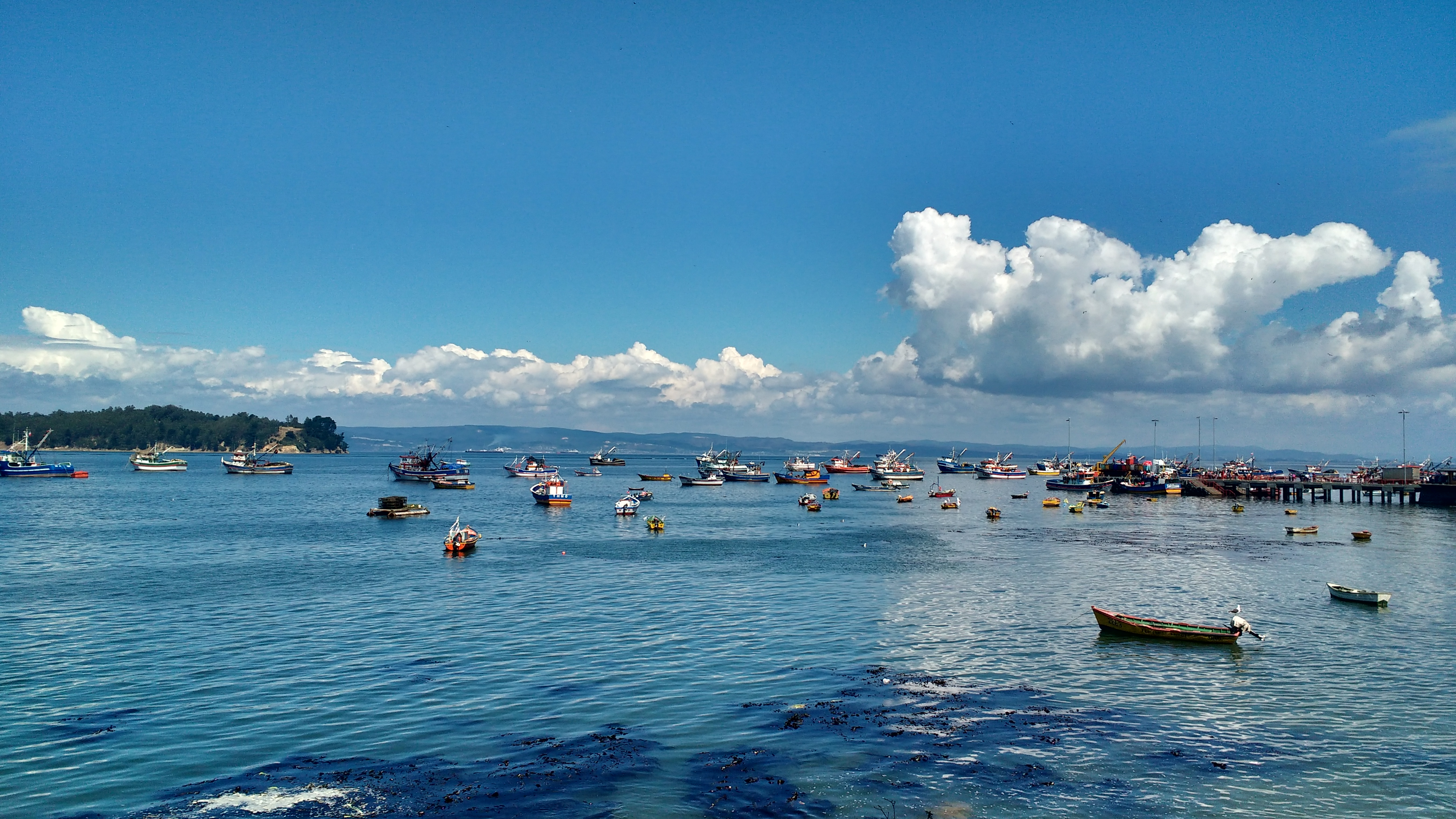 Vista de la caleta tumbes , ubicada en la comuna de Talcahuano.